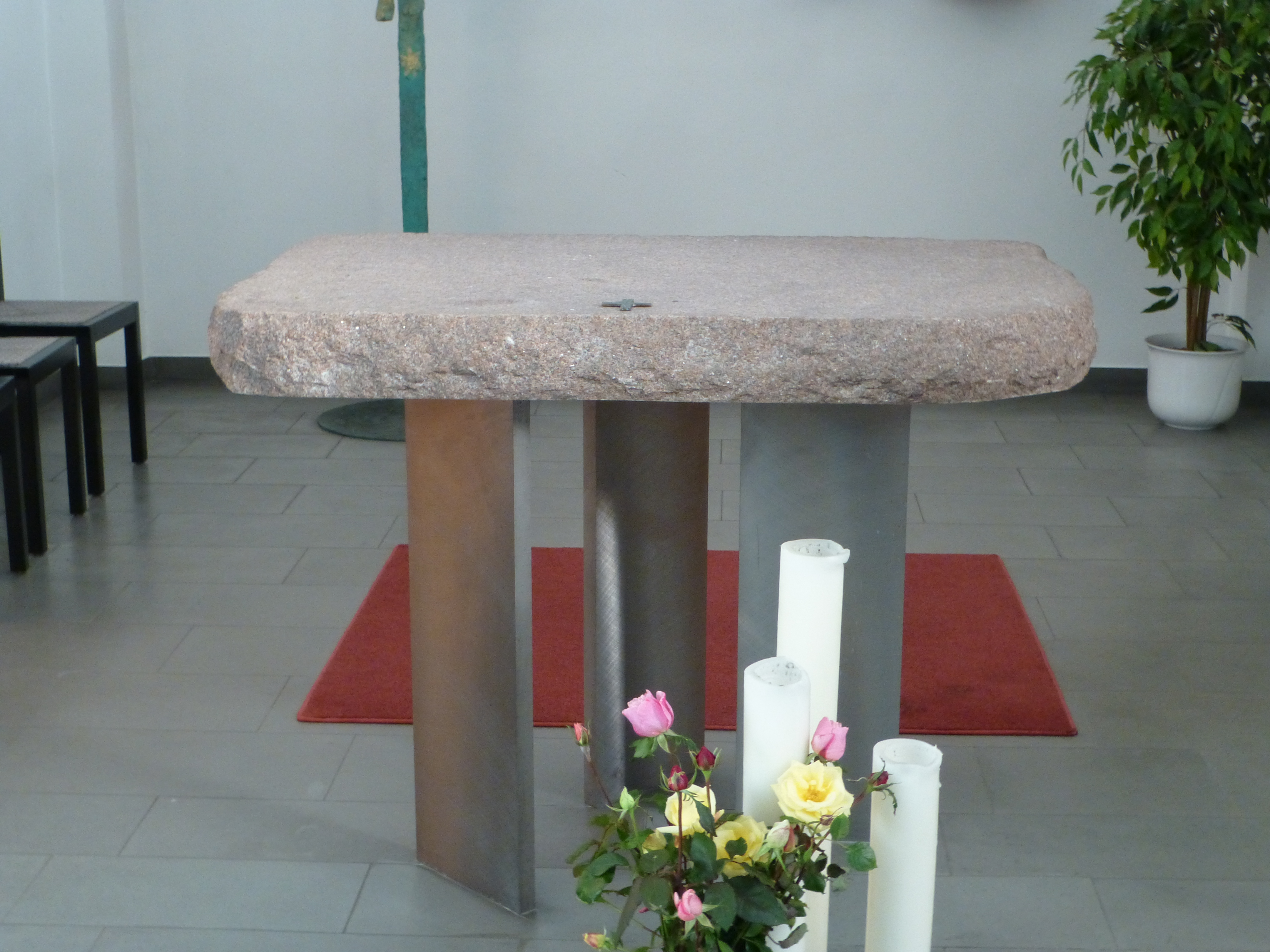 Altar in der St. Antoniuskapelle in Lustenau